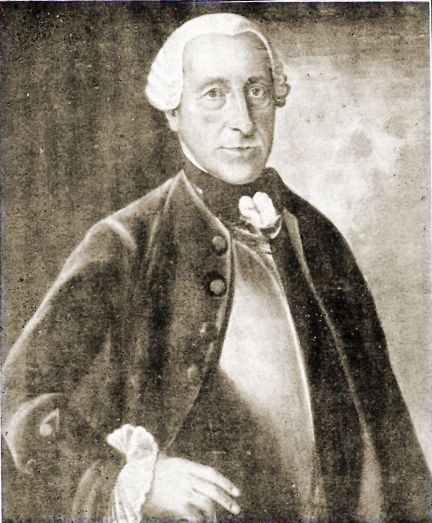 Reinhard Heinrich Bertram Vinzenz Freiherr von Pelden genannt Cloudt zu Lauersfort und Impel (1702-1770). Oelbild eines unbekannten Malers.